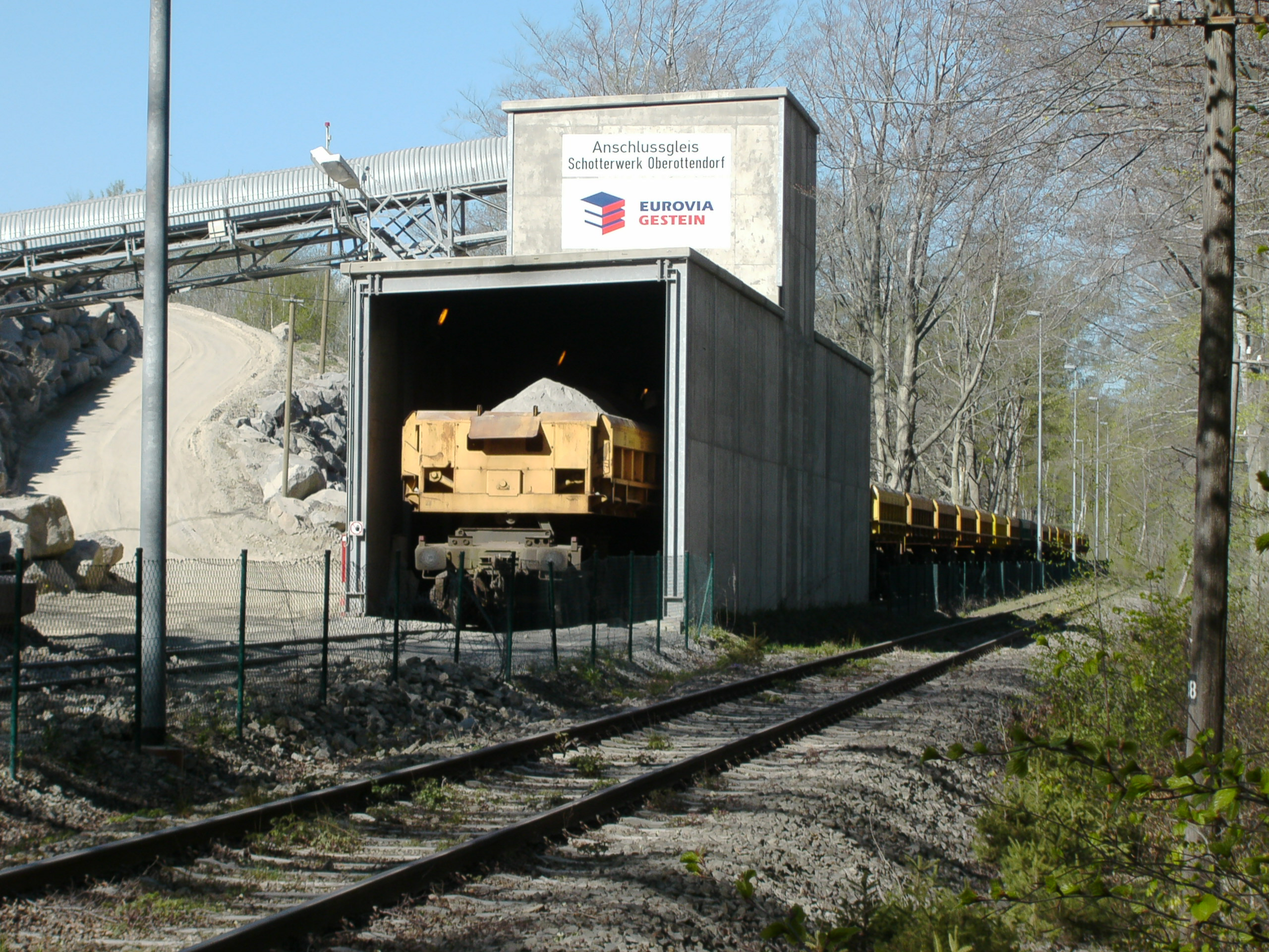 Beladung eines Ganzzuges aus Seitenkippwagen mit Kies im Anschlussgleis am Steinbruch Oberottendorf